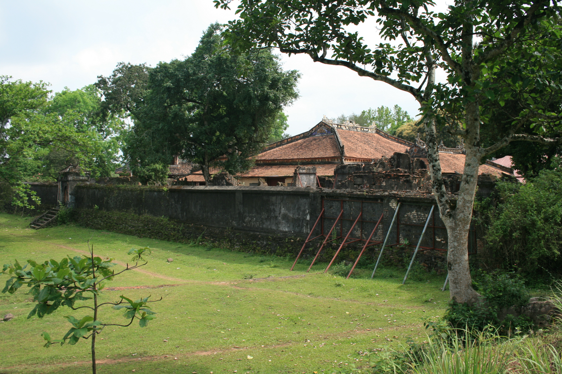 Tomb of DongKhanh (Tường ngoài lăng Khải Định xuống cấp, chưa được phục chế, mới chỉ gia cố tạm. Nơi đây và toàn lăng hạn chế tham quan)